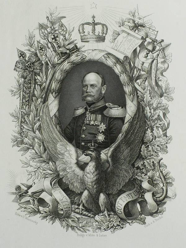 Ludwig I. König von Preußen – Brustbildnis im Medaillon – Nach dem Entwurf von Oskar Wisnieski graviert von Albert Teichel